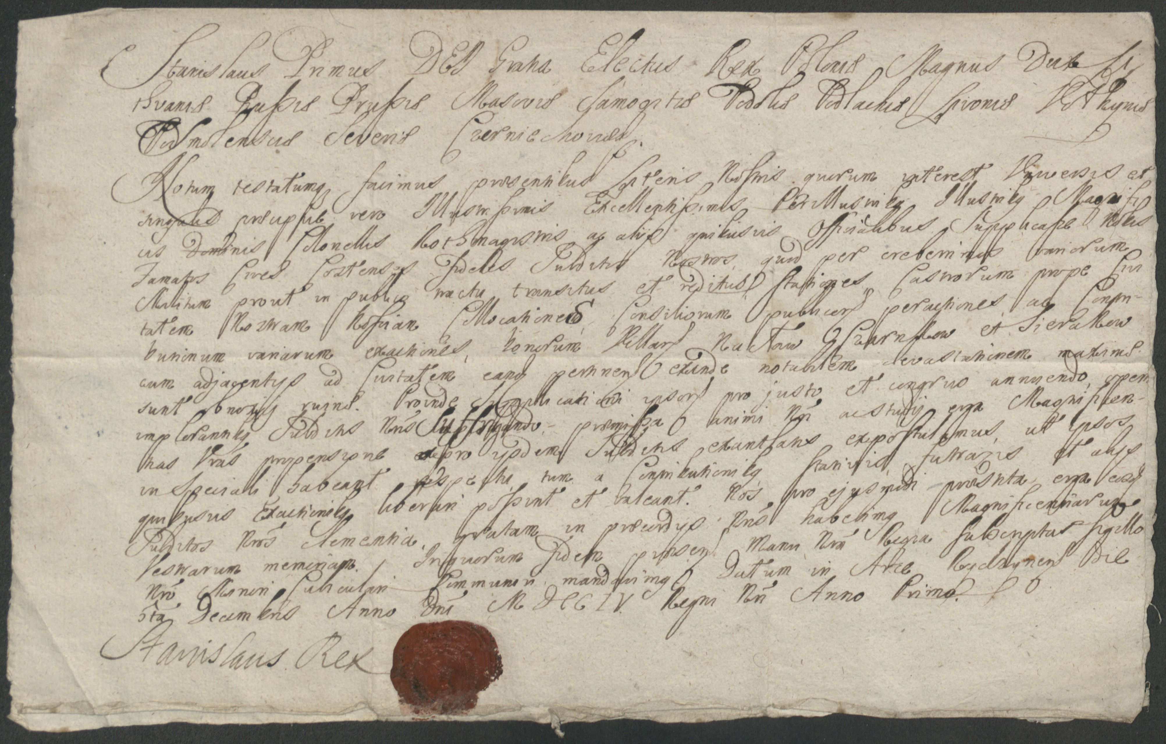 pełny zapis daty 1704.5.XII in arce Rydzynensi